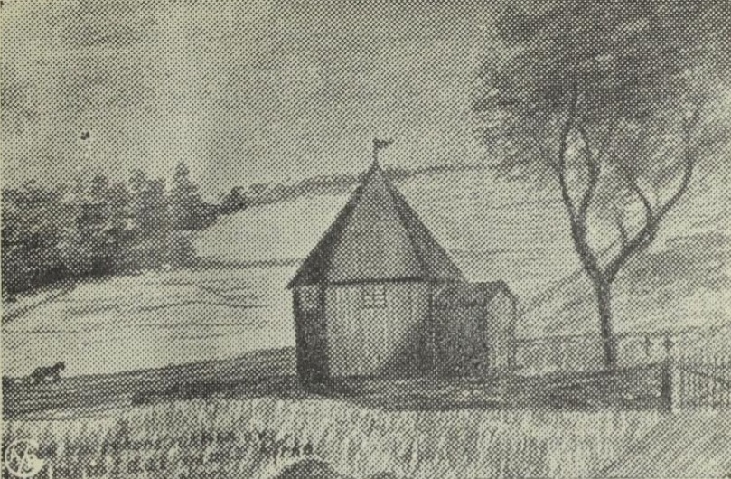 Undrumsdal gamle kirke, revet 1882. Tegnet av Bernhard Balsmo på grunnlag av eldre menneskers vitneutsagn og gjengitt i hans bok «Alvor og rariteter fra Nord-Vestfold i gamle dager» (1935).